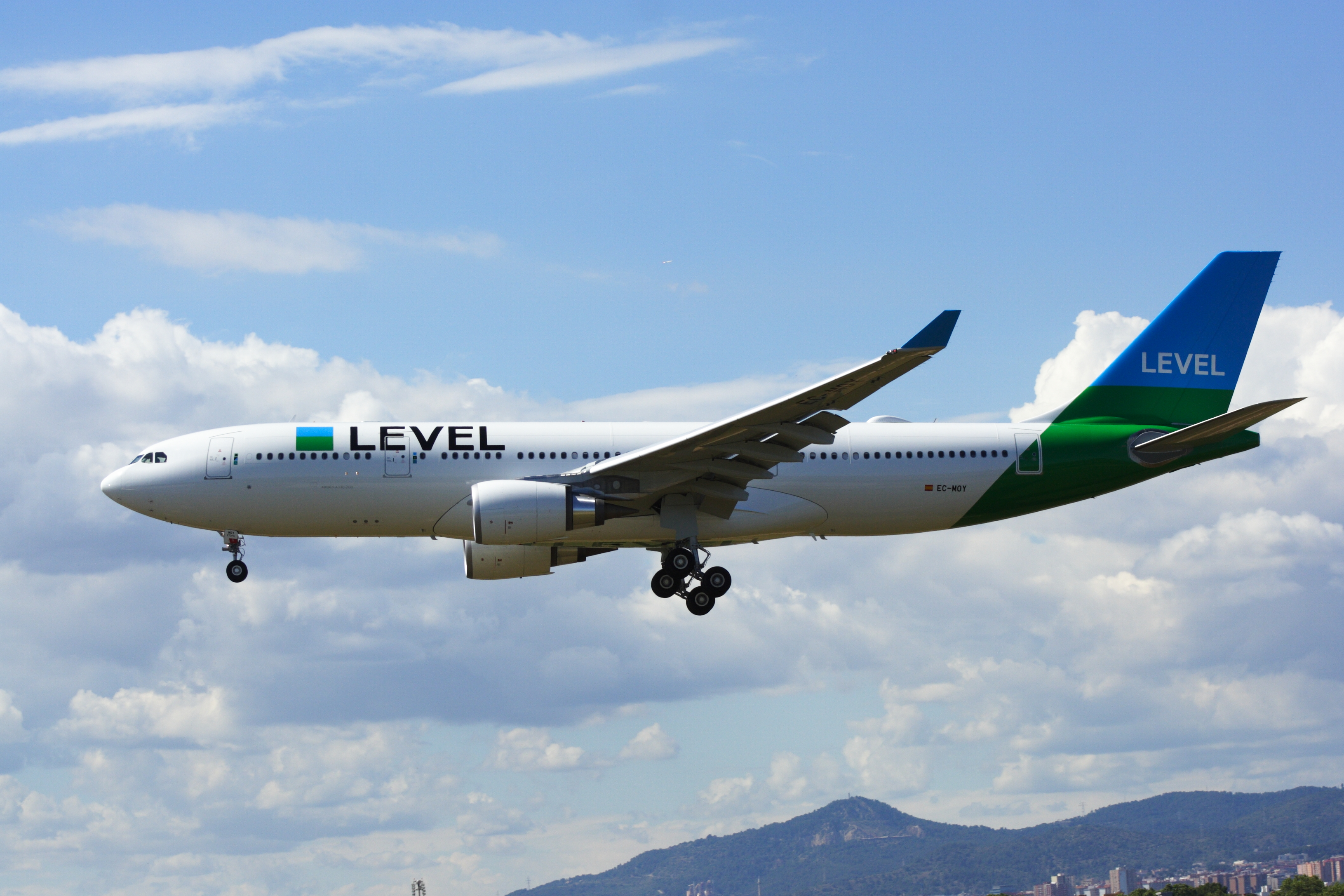 La nueva Low Cost de IAG para largo radio aterrizando en la 25R de LEBL